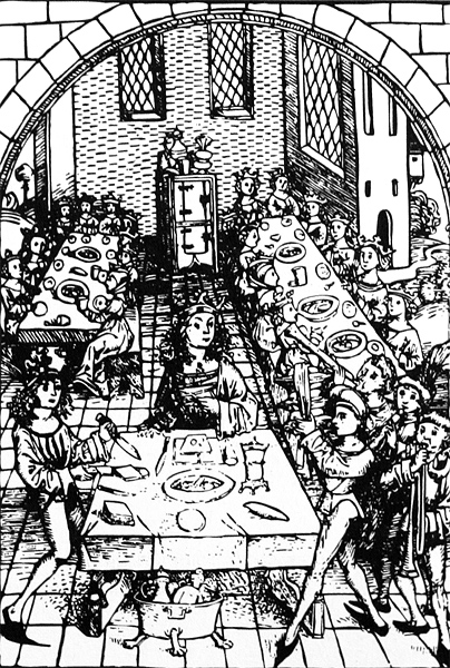 King meal